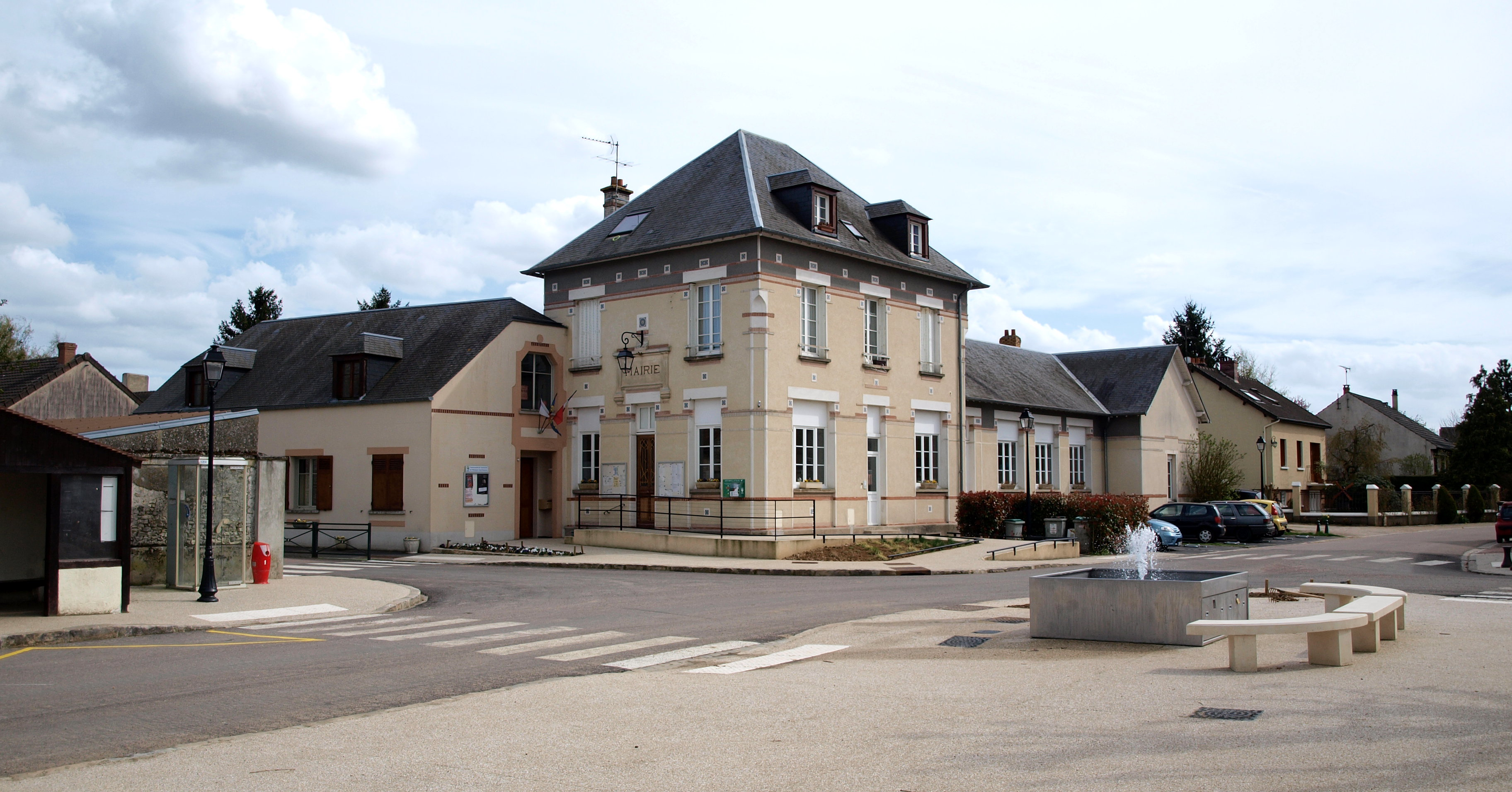 Saint-Escobille (Essonne, France) , mairie